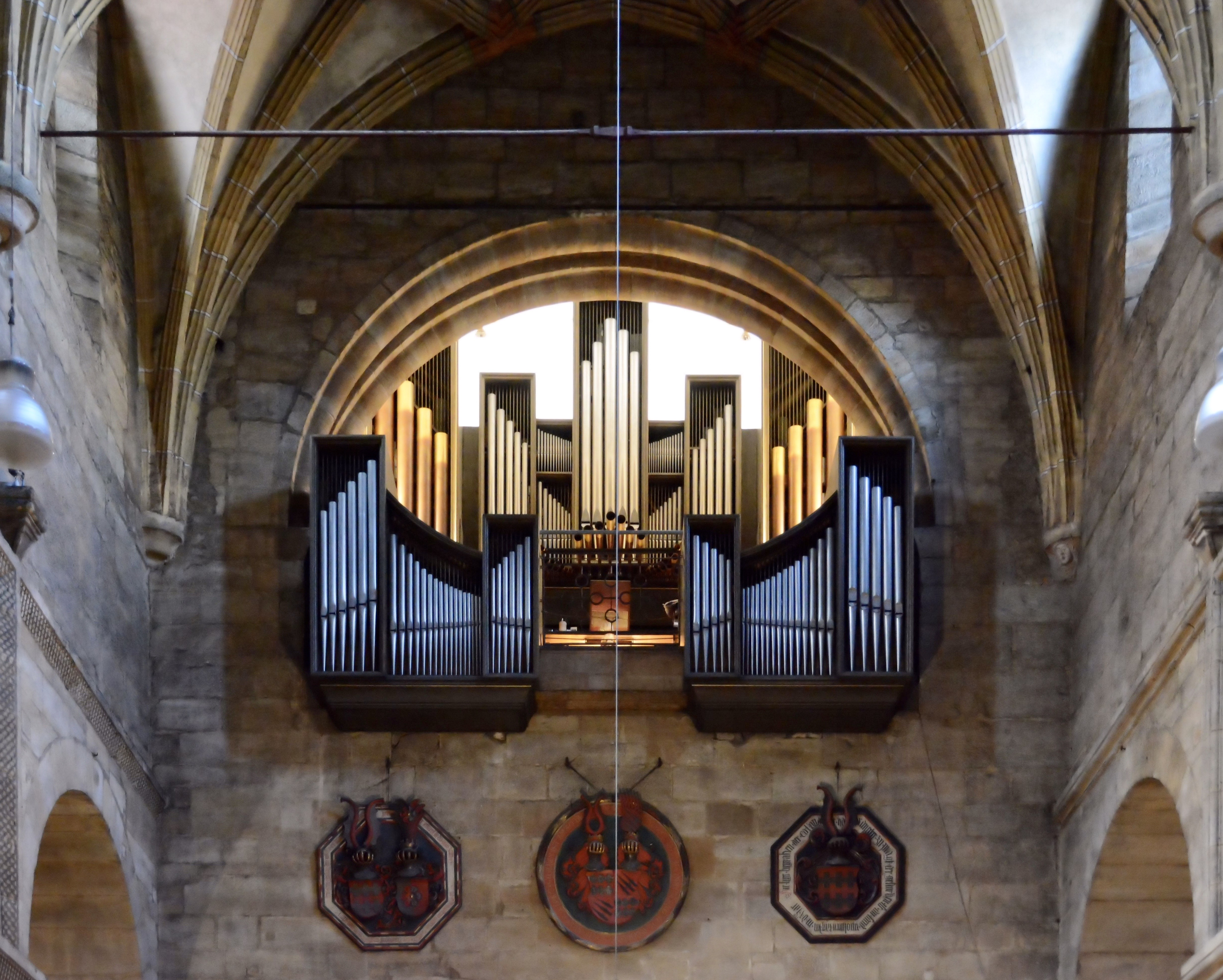 Basilika Seckau, Walcker-Orgel und Pranckher Totenschilde (Westwand) 1